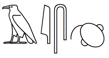 Papyrus chirurgical Edwin Smith (XVIIe siècle av. J.-C.), hiéroglyphe désignant le « cerveau » ou « moelle du crâne ».